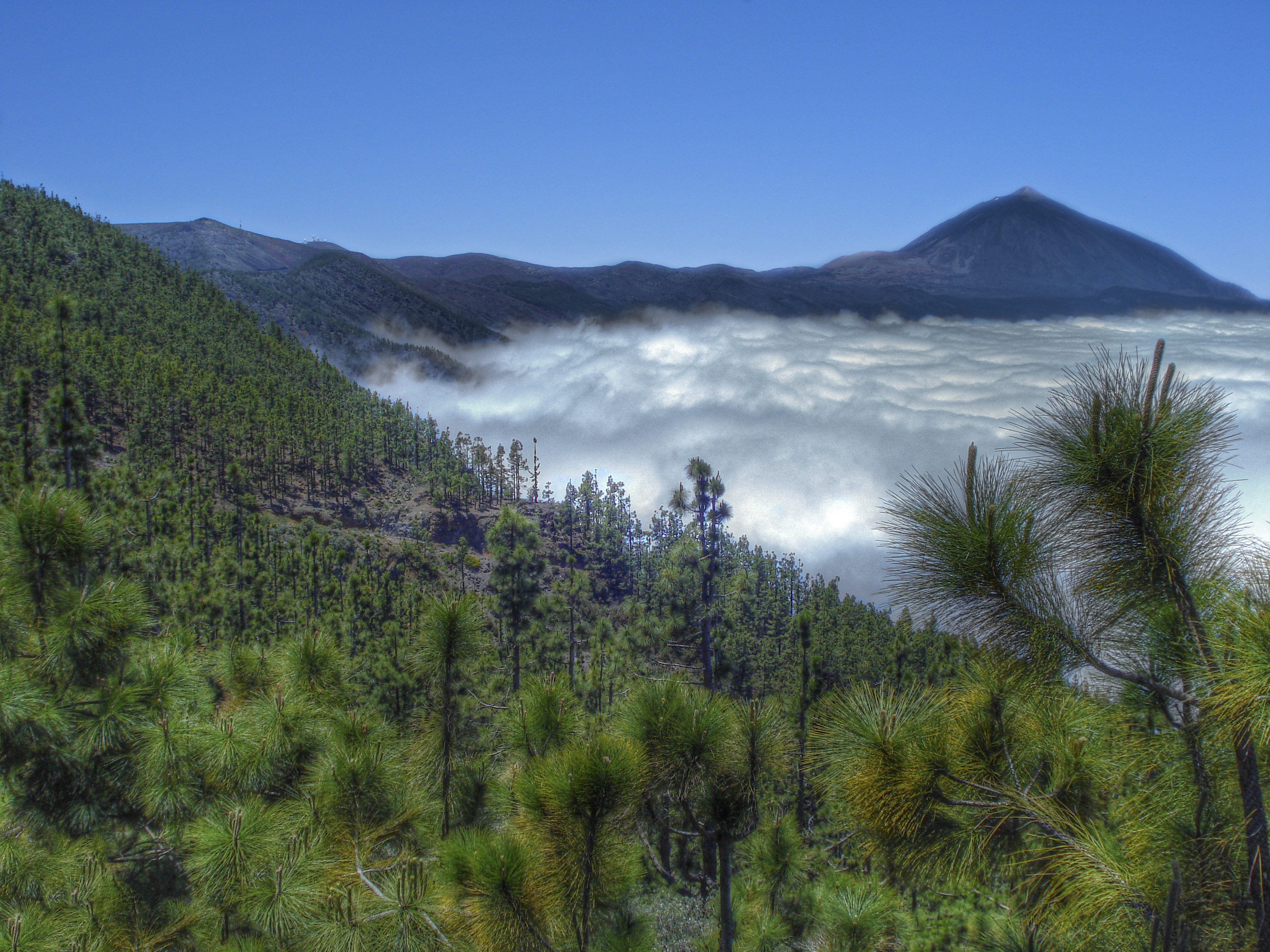 Teneriffa: Blick auf den "Teide"